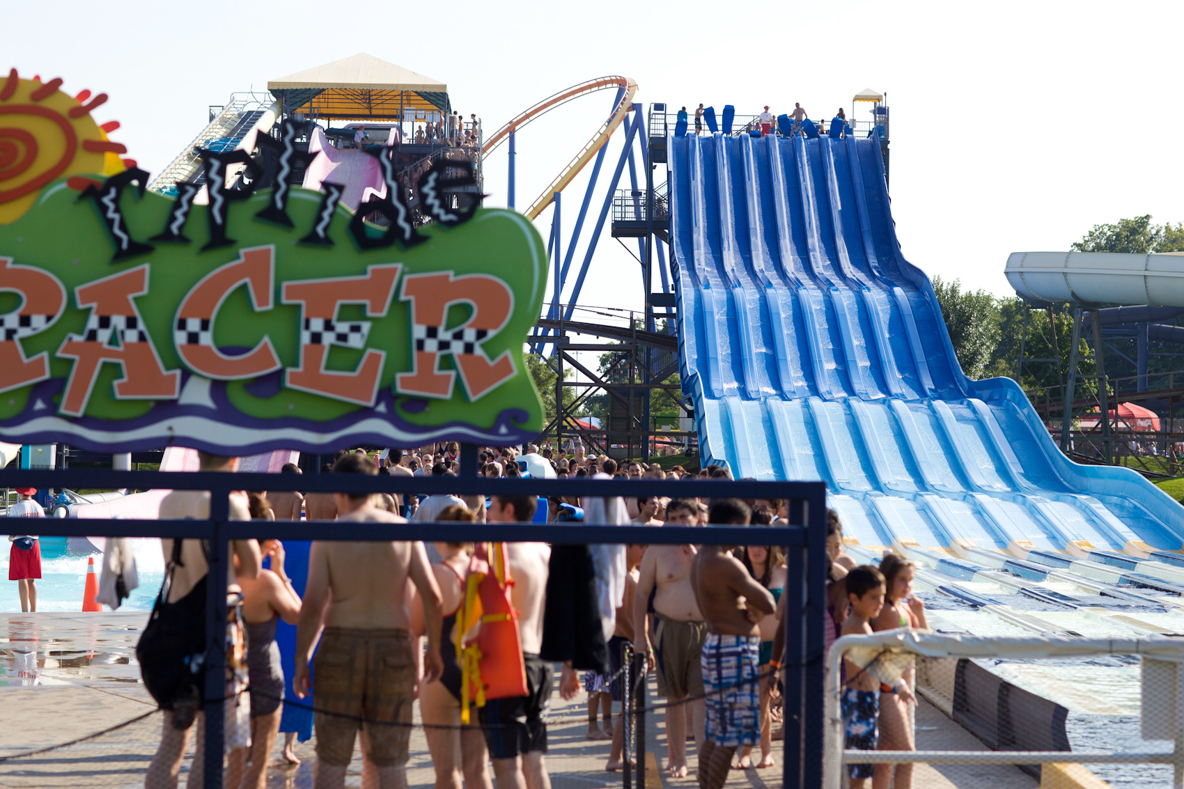 2011, Canada. Toronto.